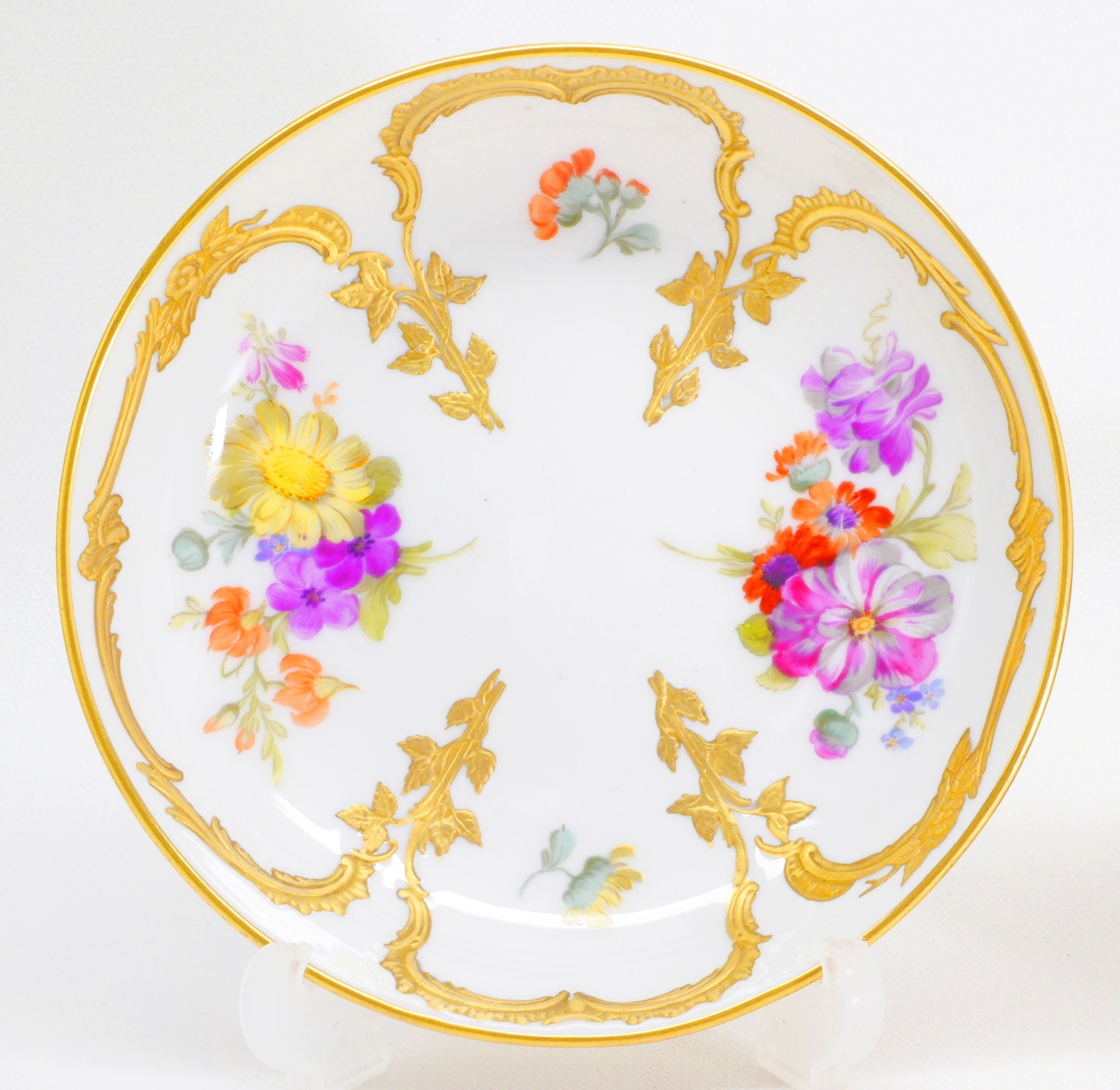 Beispiel für Neuzierat